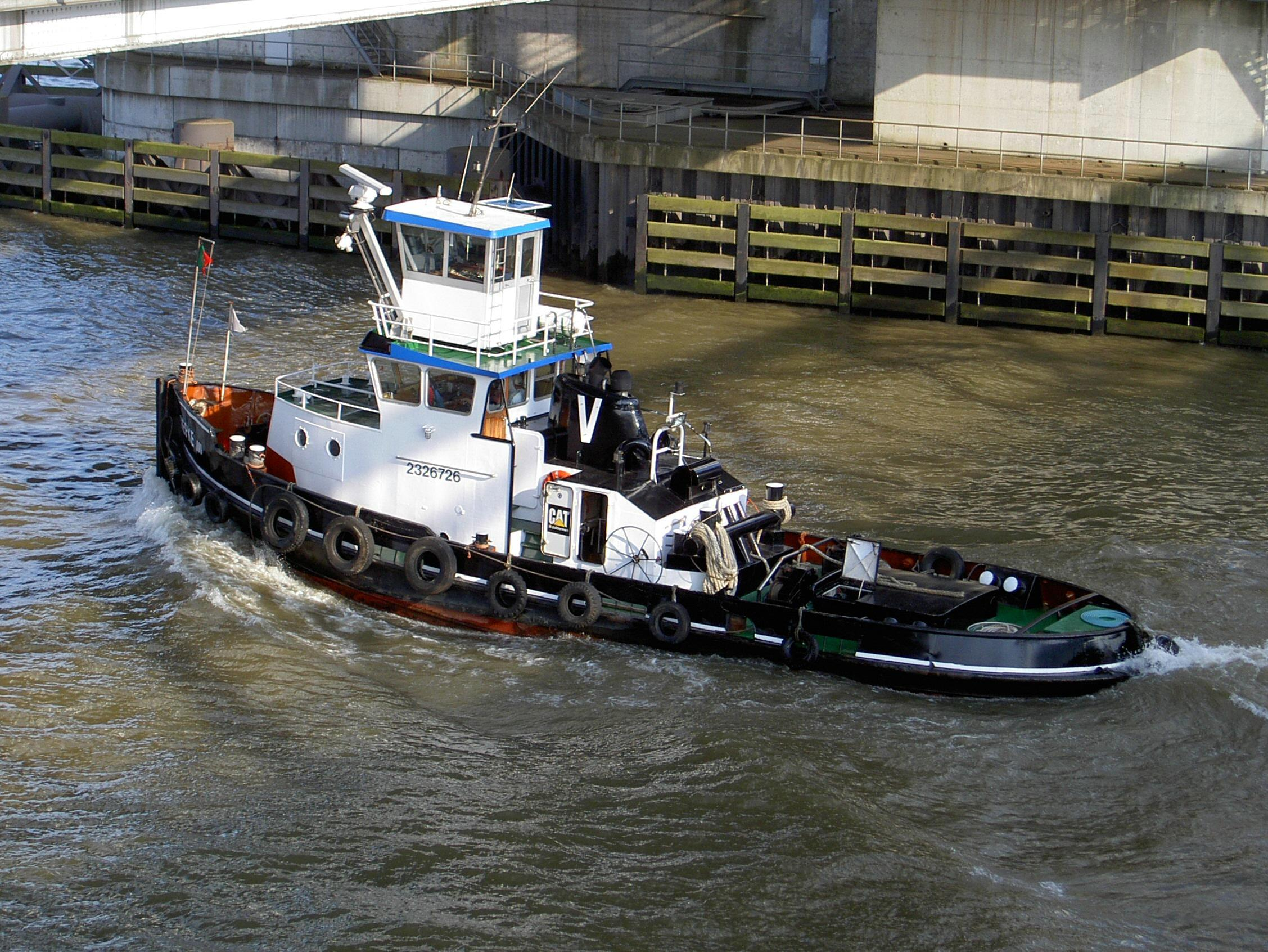 Sleepboot GEPKE III onder de brug